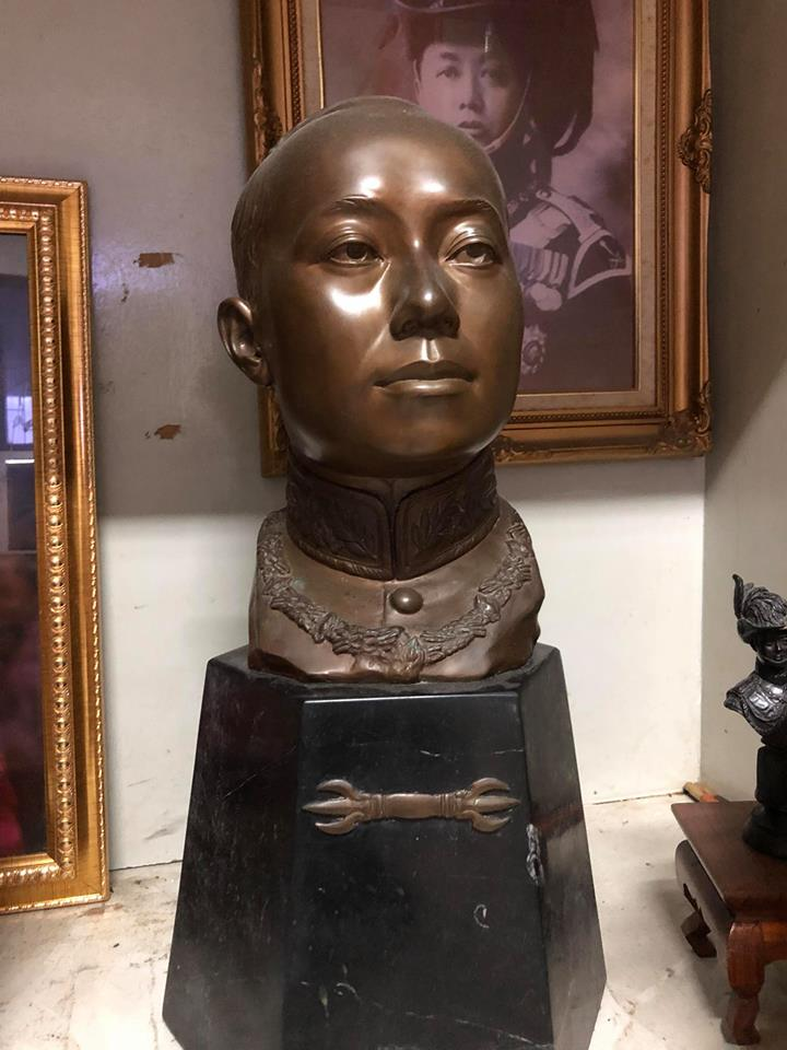 พระบรมรูปปั้นหล่อโลหะ พระบาทสมเด็จพระมงกุฎเกล้าเจ้าอยู่หัว ที่ประดิษฐานอยู่ในห้องลูกเสือกองร้อยพิเศษเพชรบงกช เป็นมิ่งขวัญให้ครูและลูกเสือมาช้านานทำไมถึงสง่างามเช่นนี้ สาเหตุเพราะองค์ล้นเกล้ารัชกาลที่6 เสด็จมาเป็นแบบด้วยพระองค์เอง